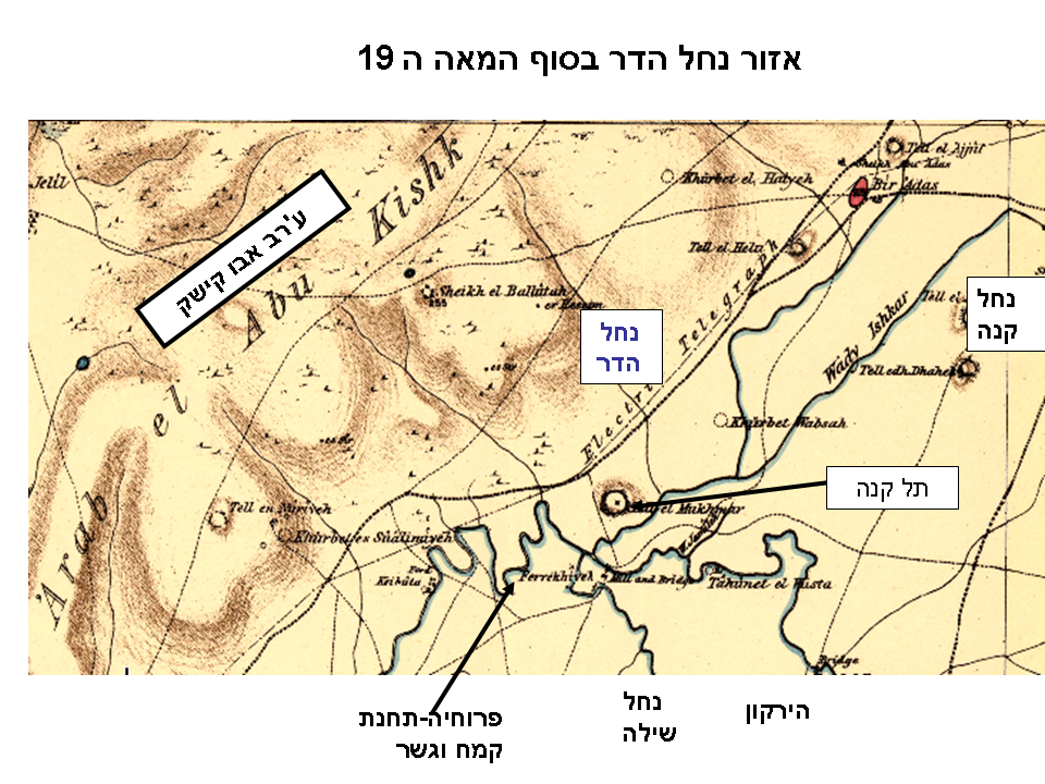 הדר בסוף המאה ה 19אזור נחל